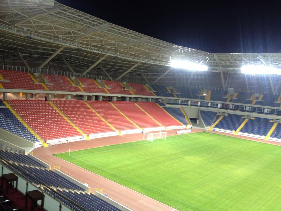 Açılış maçı olan Gaziantep karşılaşması önce çekilmiş bir fotoğraf.